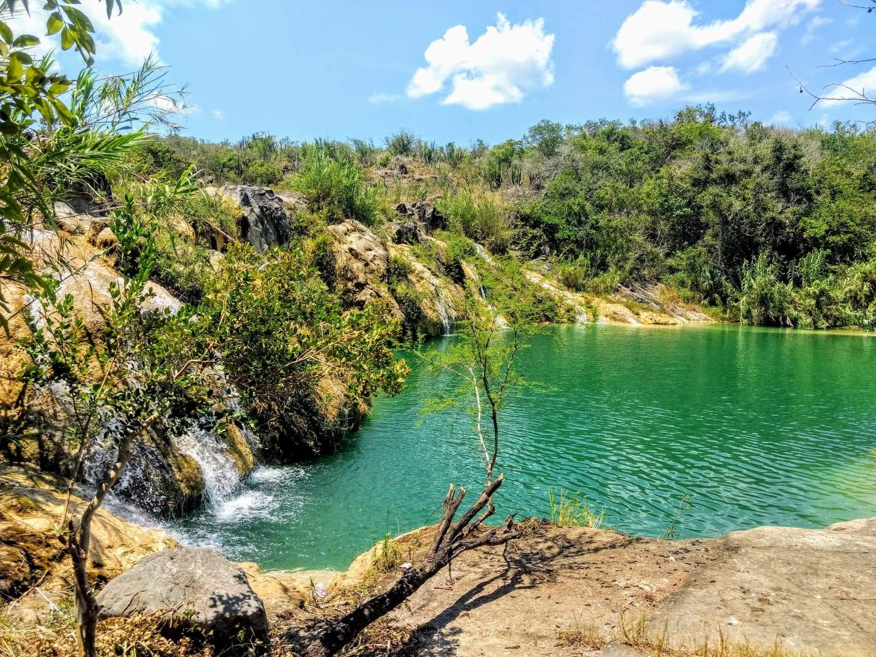 Se puede apreciar un area natural